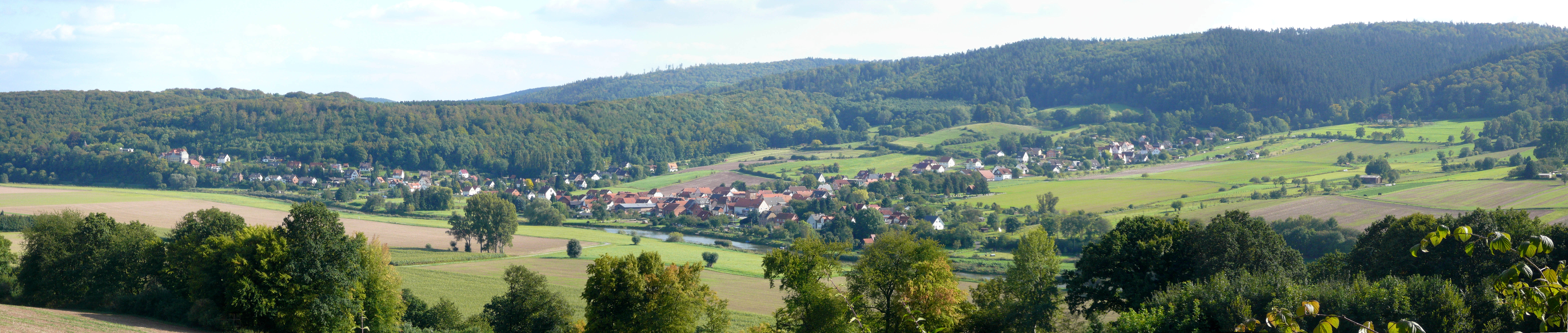 Blick von Nordwesten vom Burgweg nahe dem Römerlager Hedemünden auf das Werratal und Oberode, Stadt Hann. Münden, Südniedersachsen. Im Hintergrund der Kaufunger Wald.